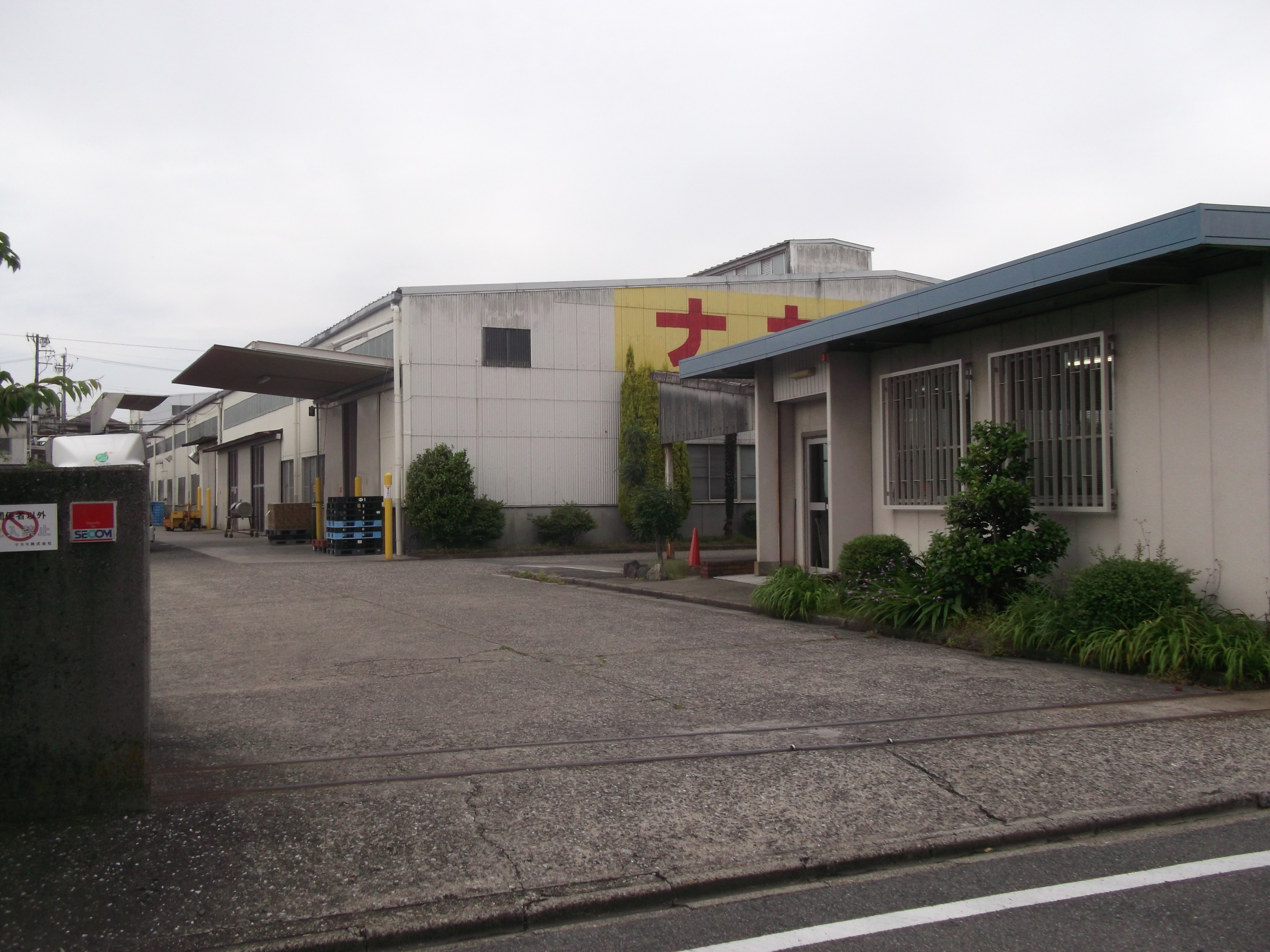 愛知県清須市西枇杷島町地区にあるナカモの本社を南側公道より写す